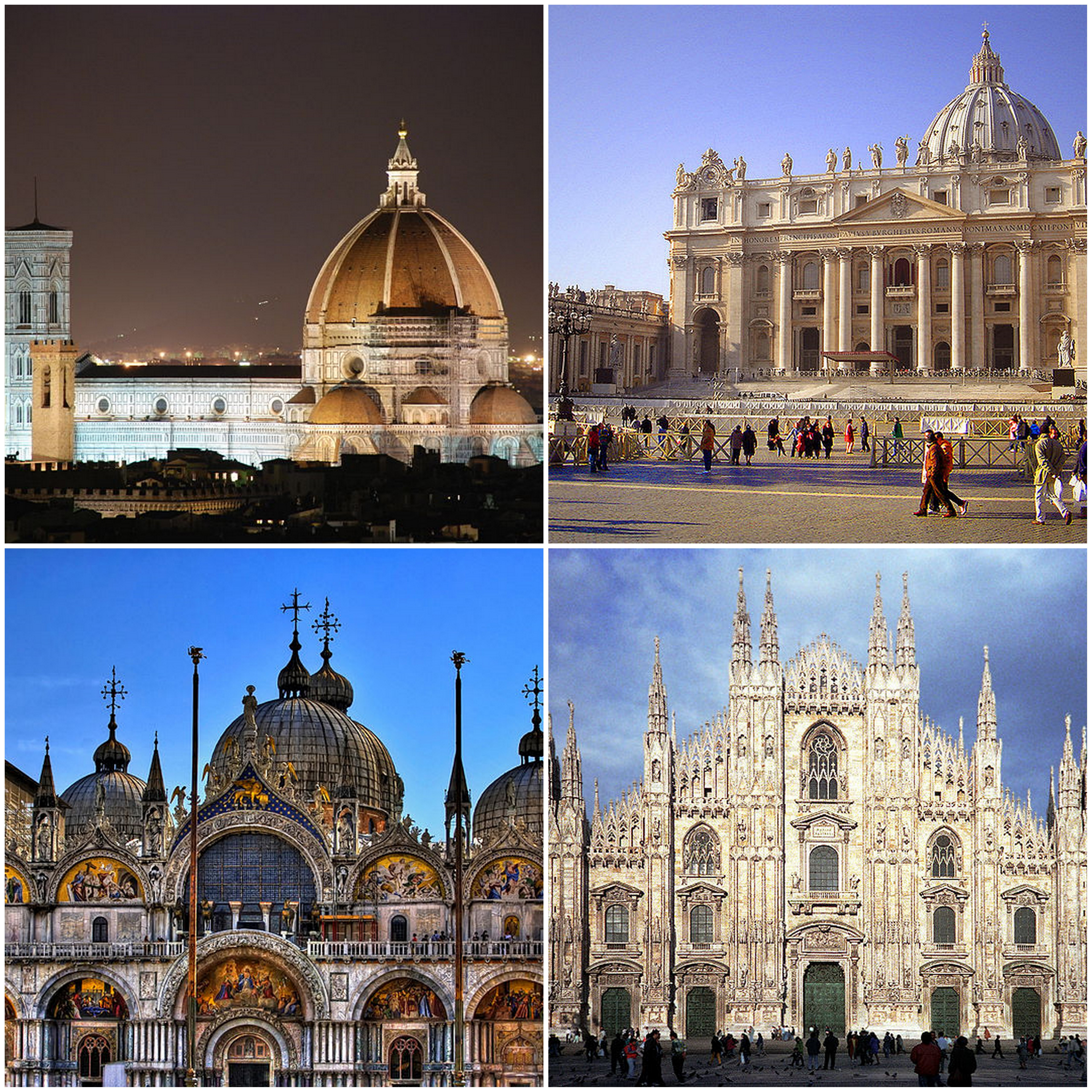 Collage di quattro foto sulle chiese italiane.